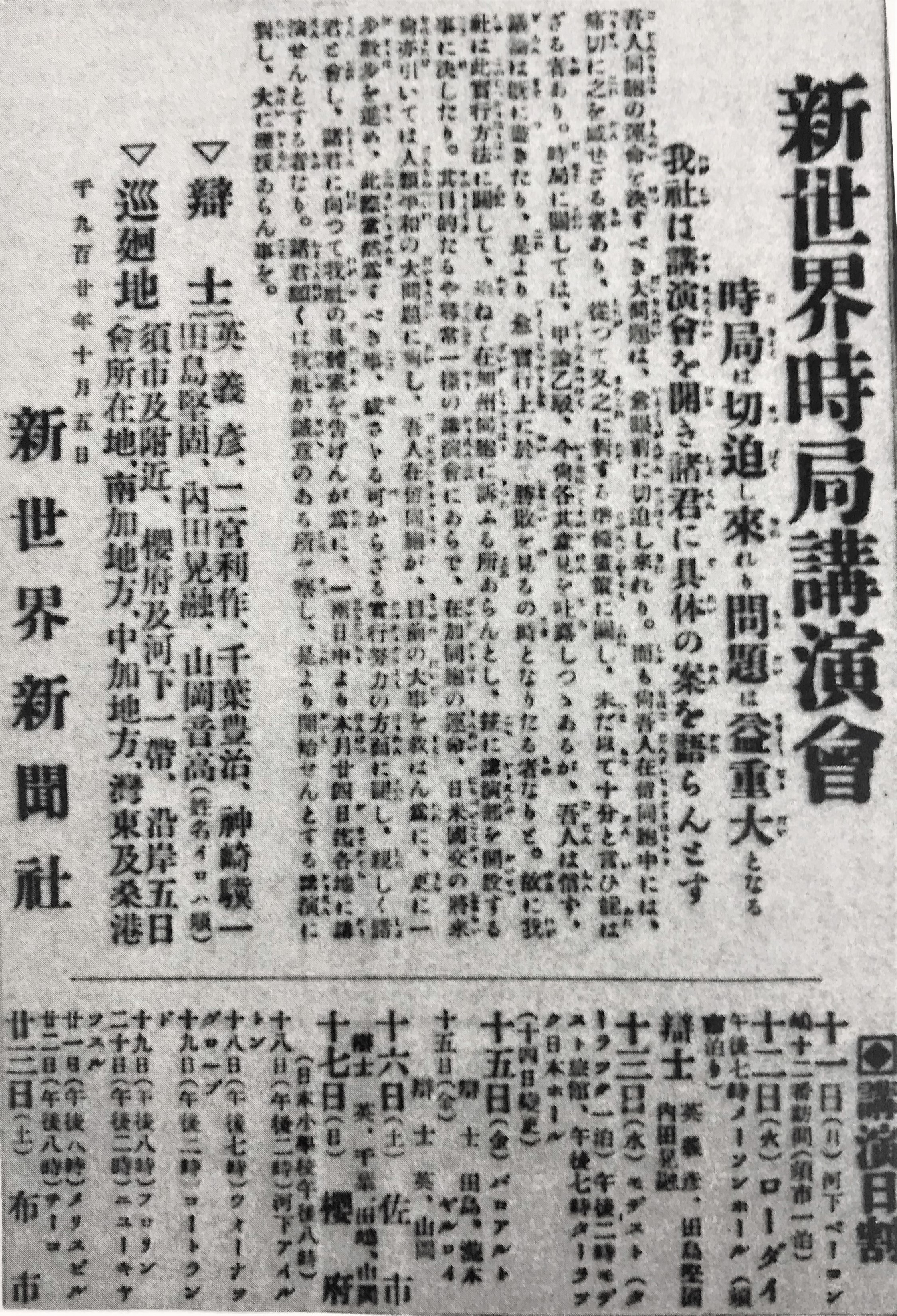 在加州日本人向け新聞社(新世界新聞社)が主催した時局講演会案内